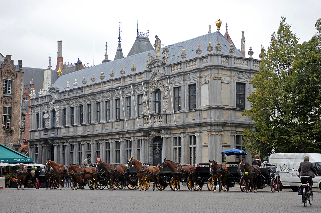 Burg 18-09-2009